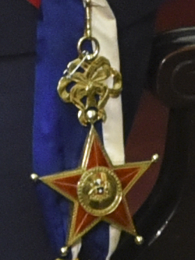 La Piocha de O'Higgins